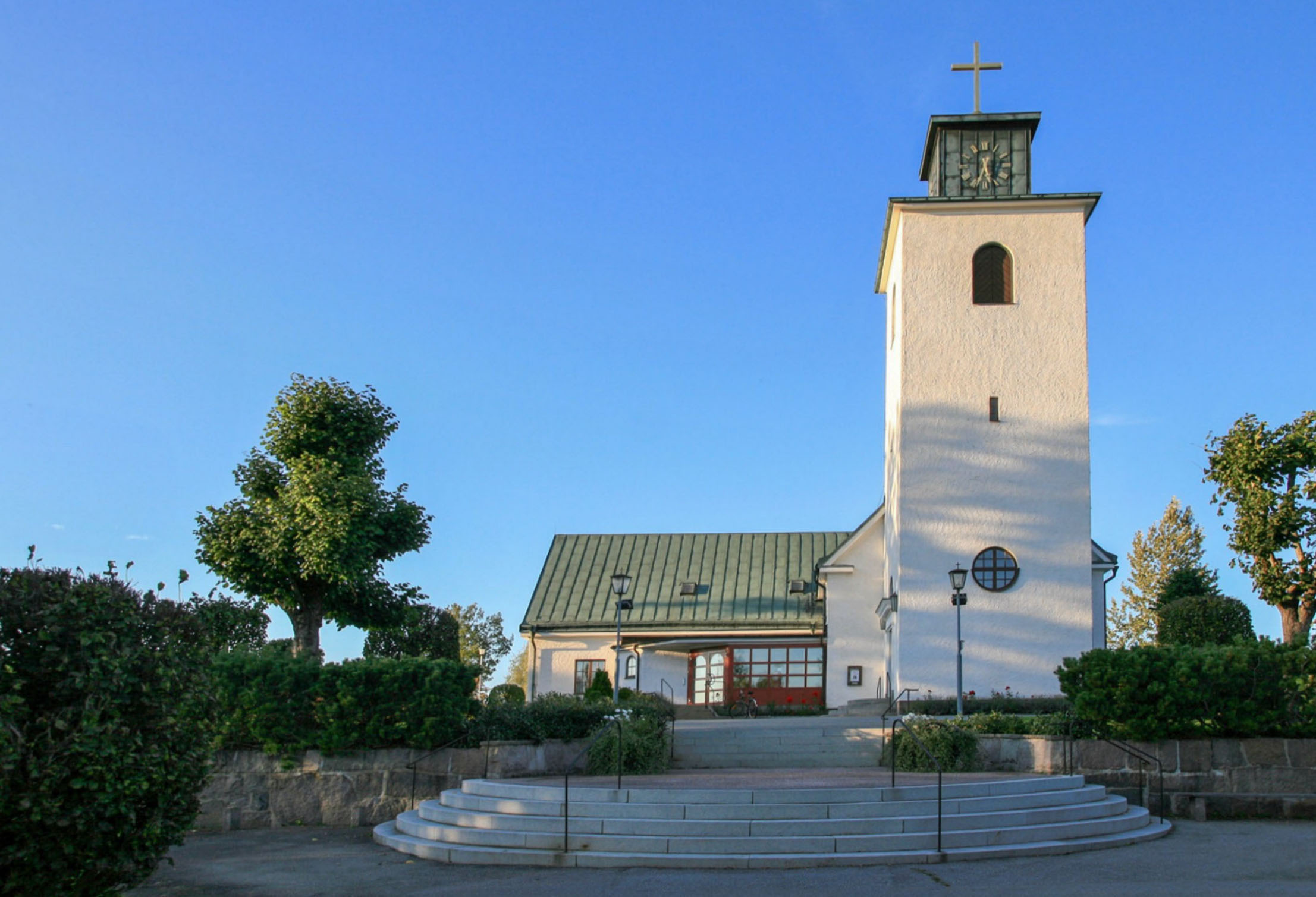 Emmaboda Kyrka (Eken2)